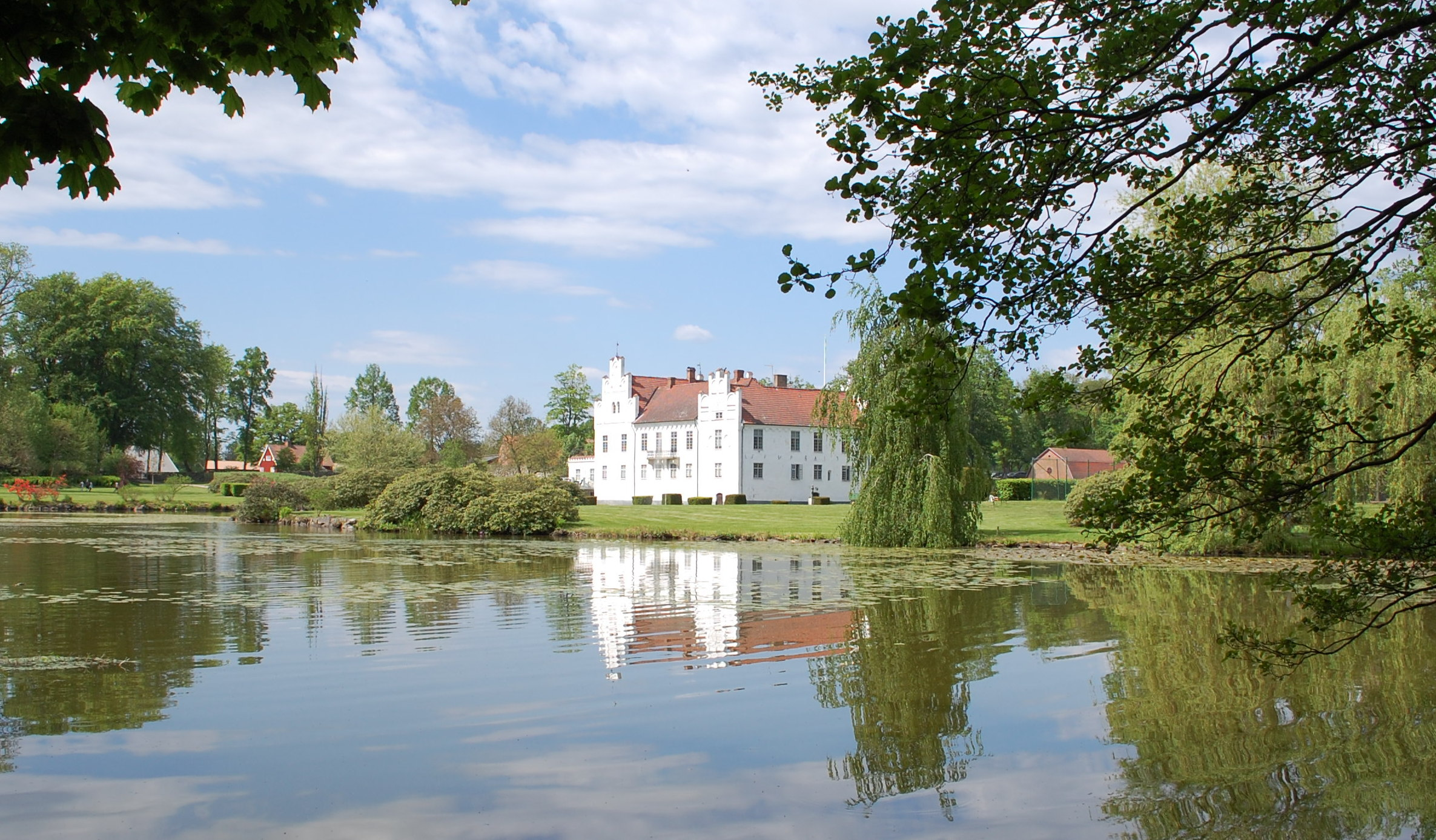 Schloss Wanas